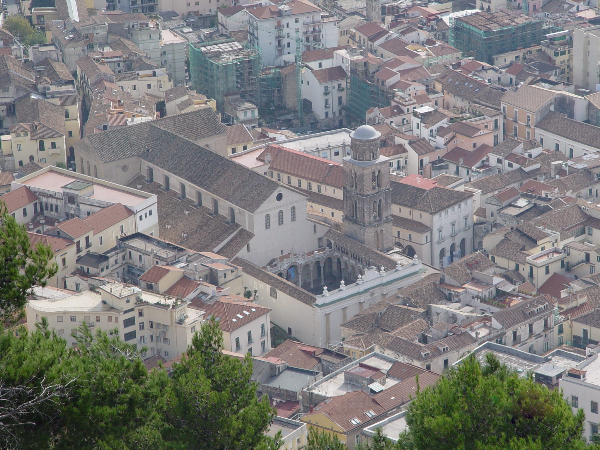 Duomo di Salerno visto dal Colle Bonadies. Foto personale. Salerno, novembre 2003